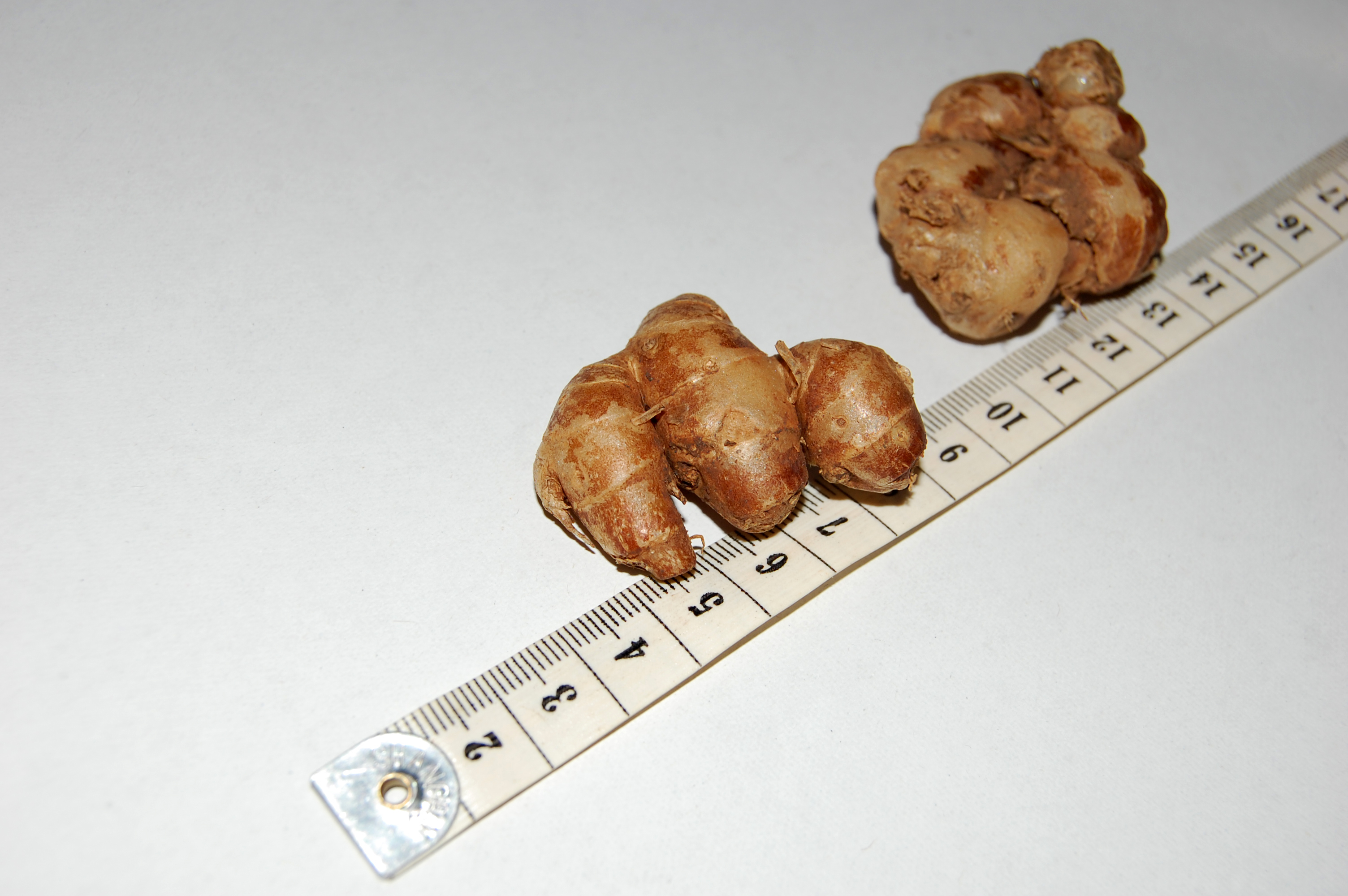 Kencur (Bahasa Indonesia)